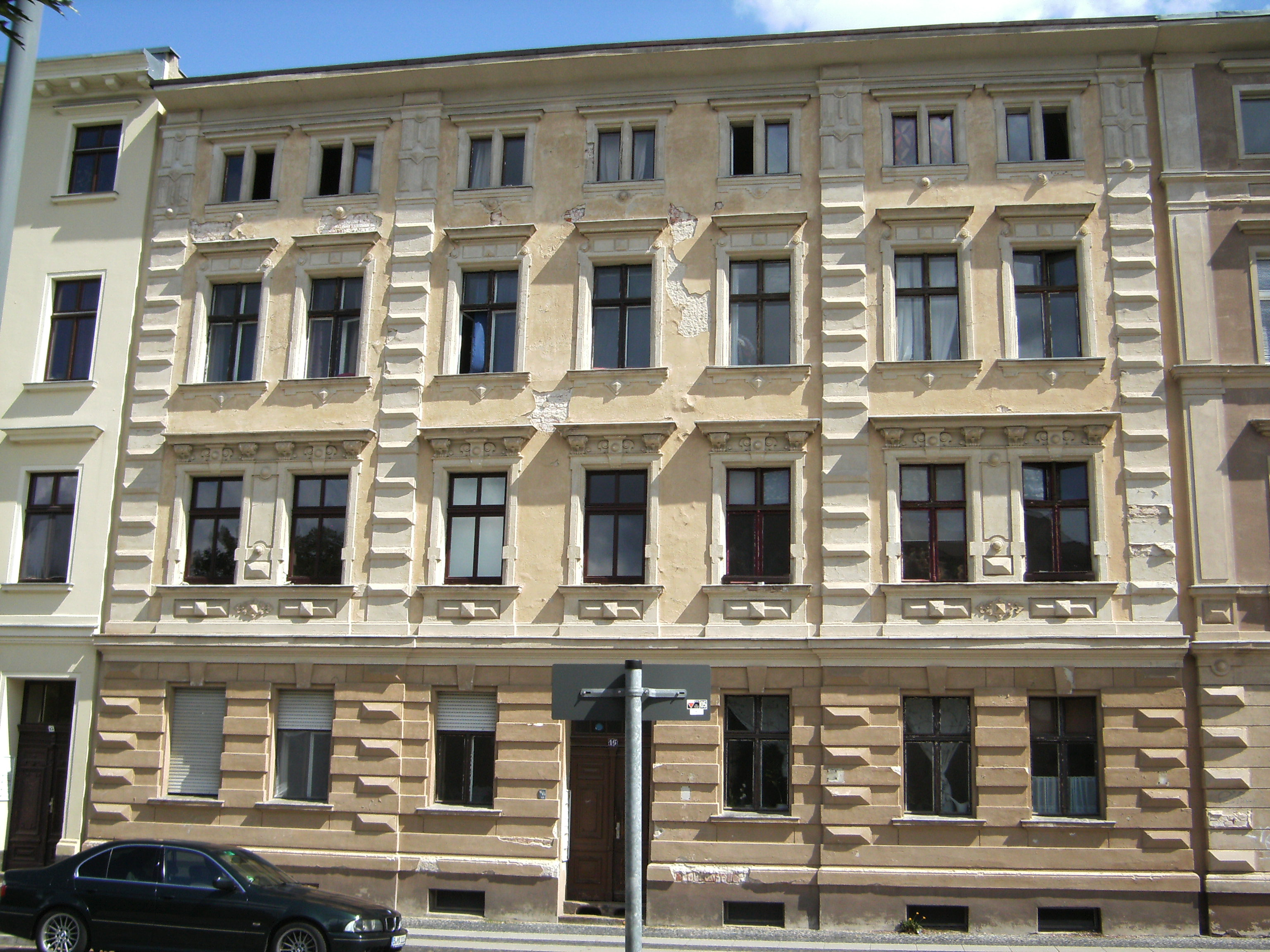 Wernerstr. 16